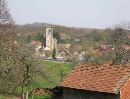 photo du village d'Auxelles-Bas vu depuis le haut du village prise le 16/04/2004 par LP90. licence GFDL LP90 avril 2004